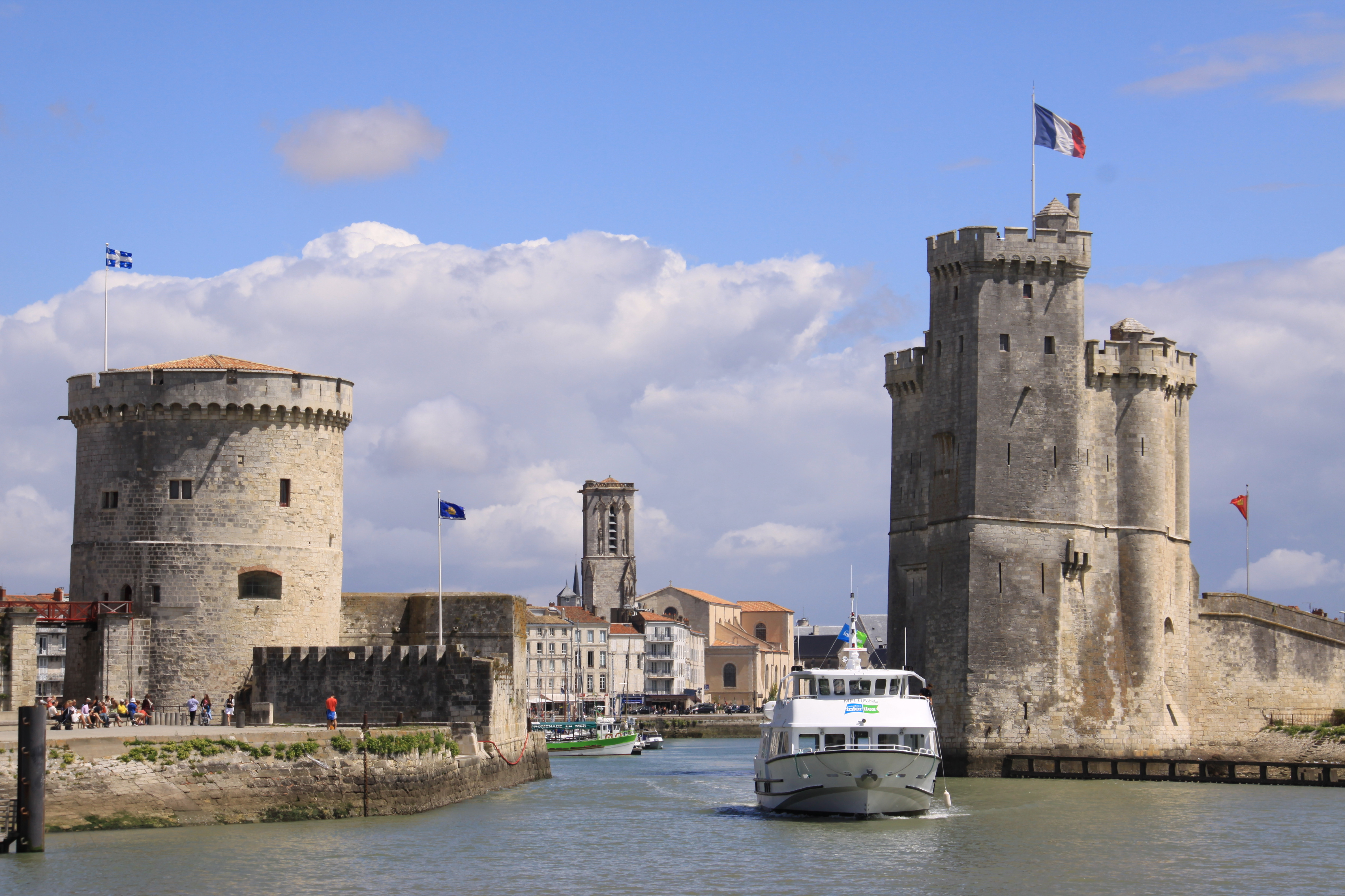 Un bateau de promenades en mer sortant du Port de La Rochelle et passant entre les tours de la Chaîne (à gauche) et Saint-Nicolas (à droite). A l' arrière plan du bassin d' échouage on voit l' église Saint-Sauveur. La Rochelle, Charente Maritime, France.